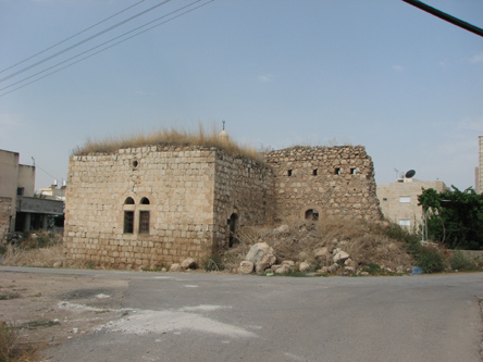 sandala village